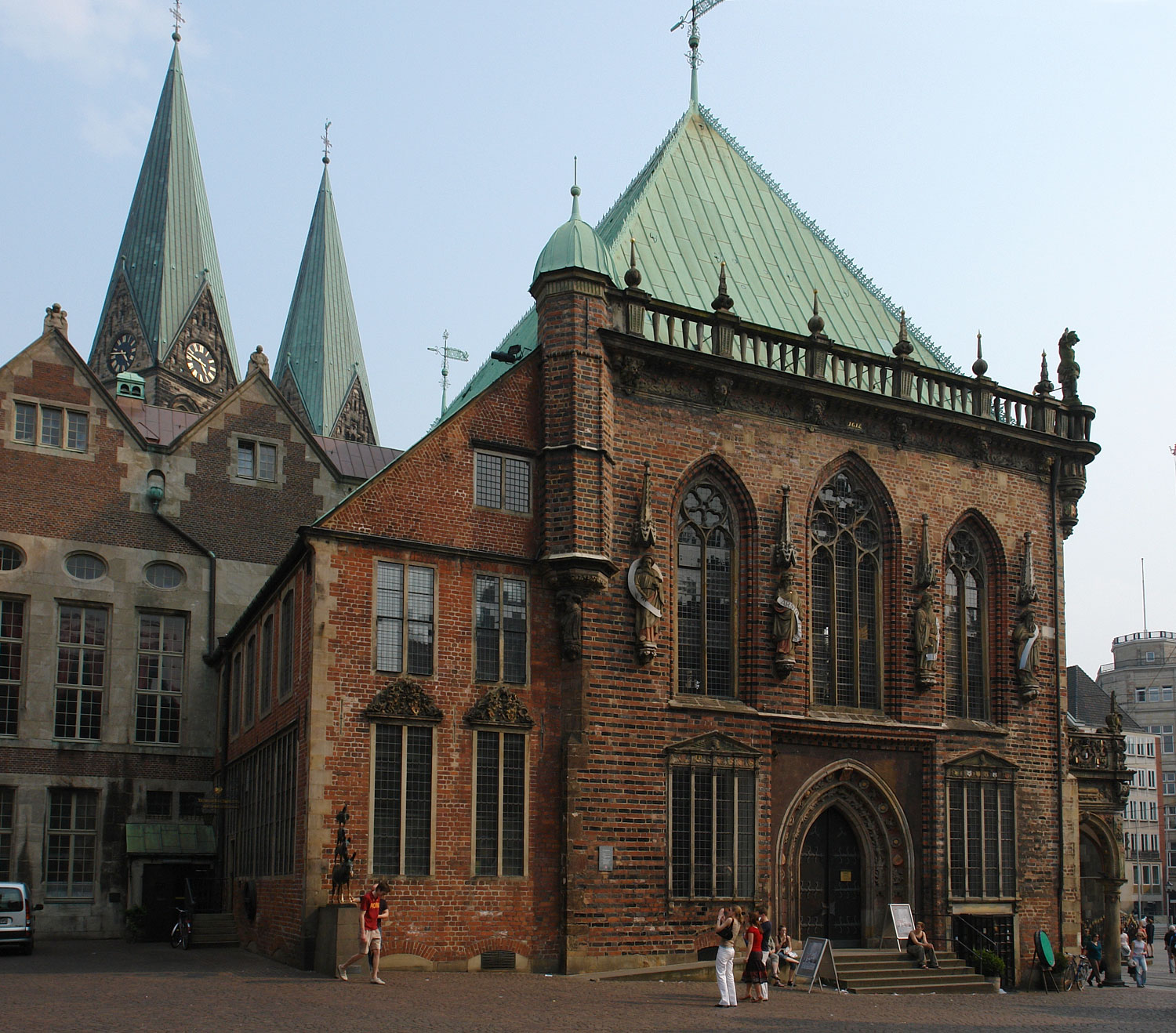 Rathaus in Bremen. Südseite mit Stadtmusikanten und Domtürmen